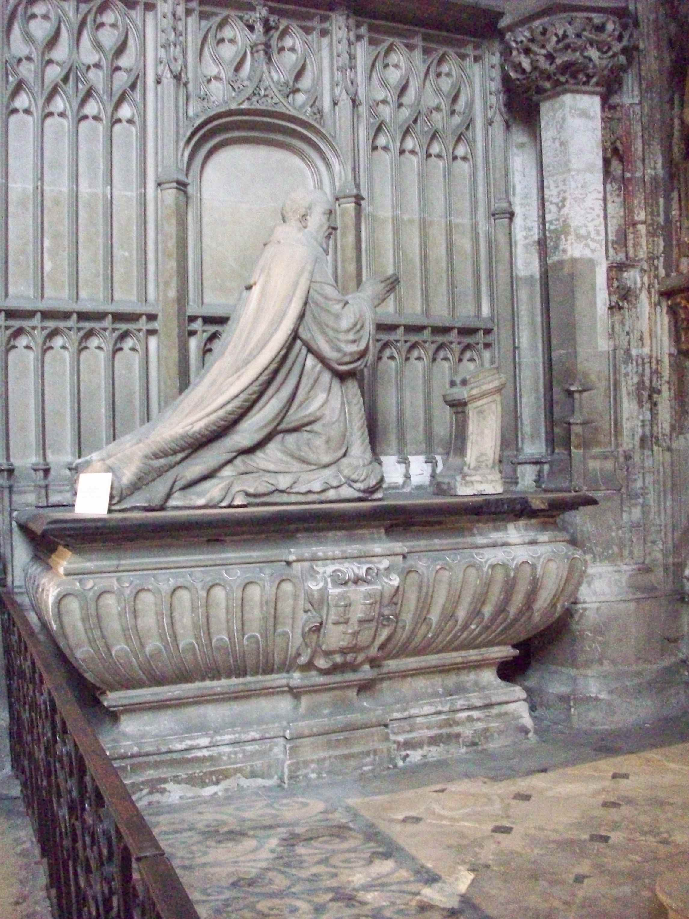 Priant de Claude Groulard dans la chapelle Saint-Etienne-la-Grande-Eglise.